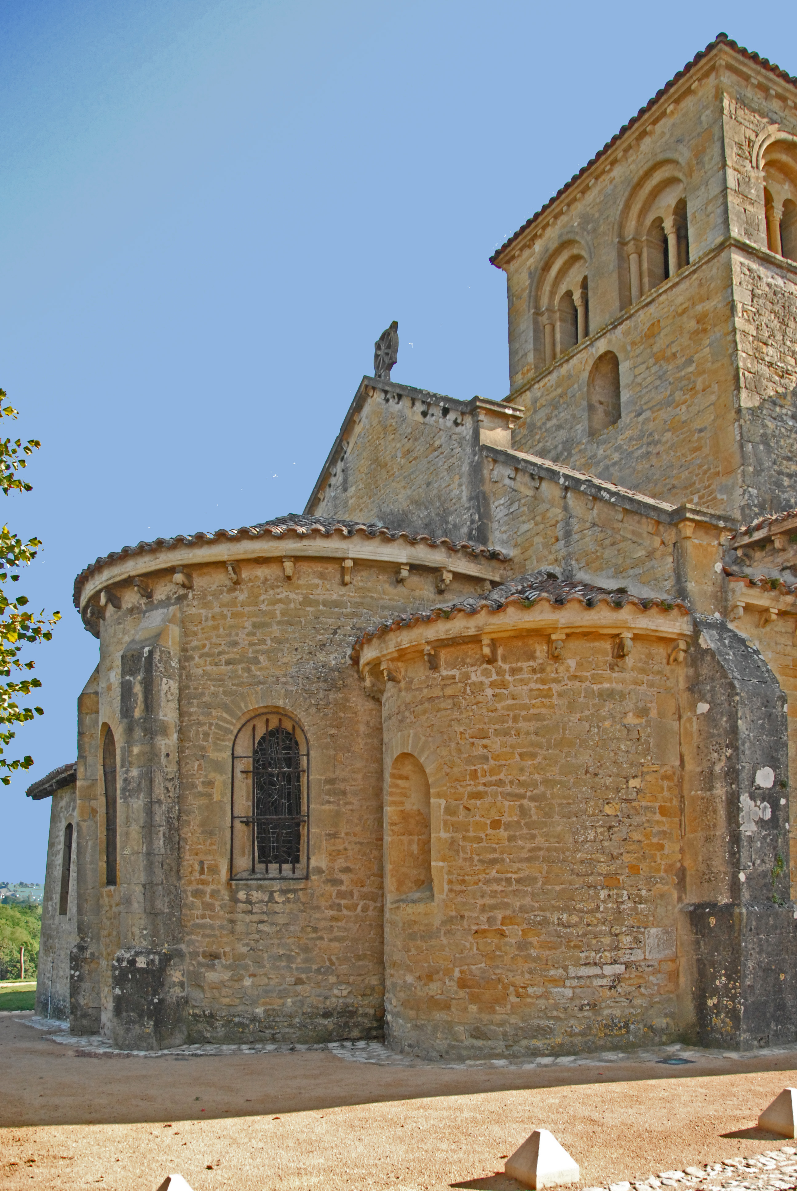 St-André d'Iguerande, Chorhaupt von Nordwesten